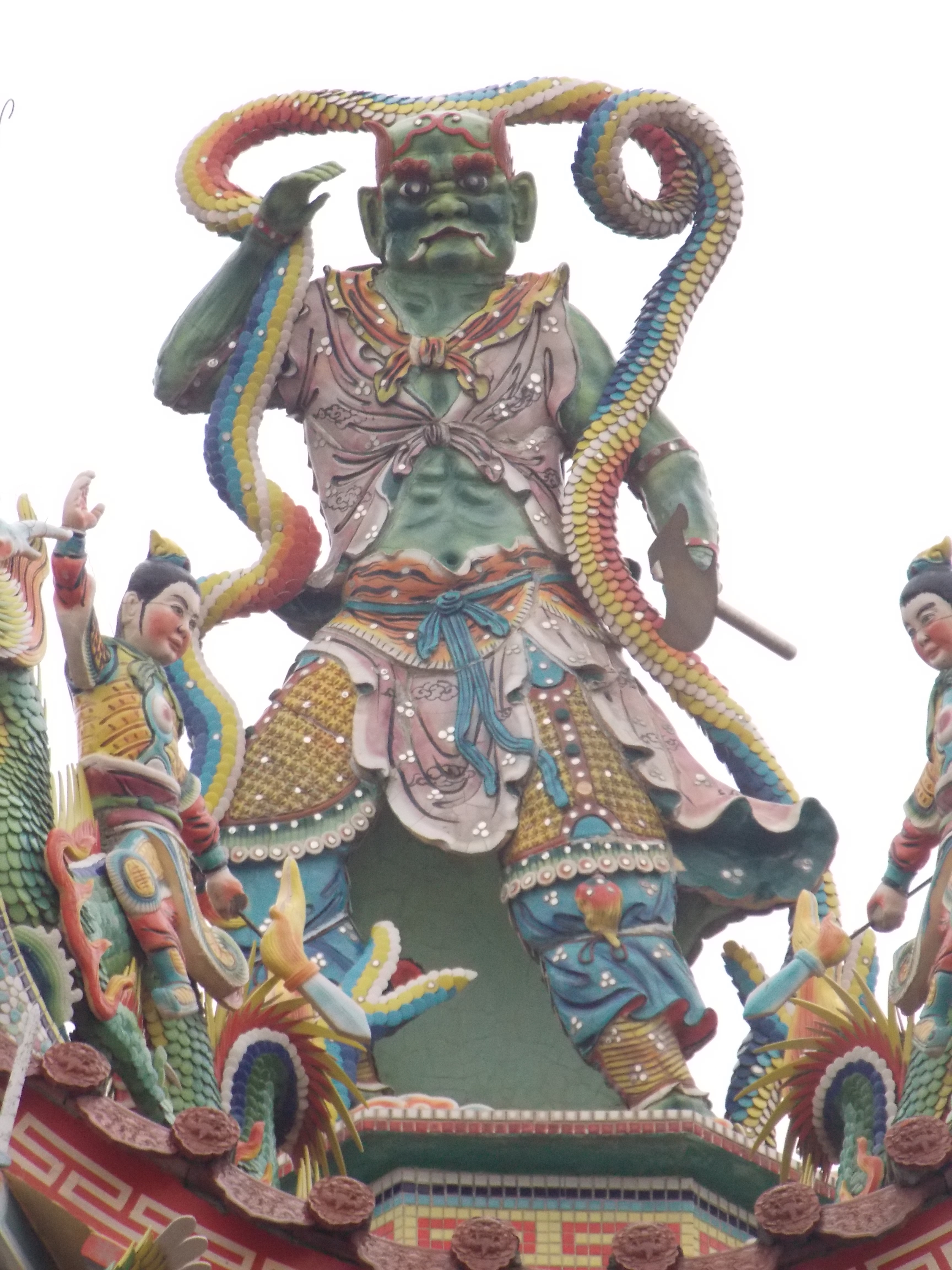 位於三股龍德宮，龍鍾樓頂的"千里眼將軍"